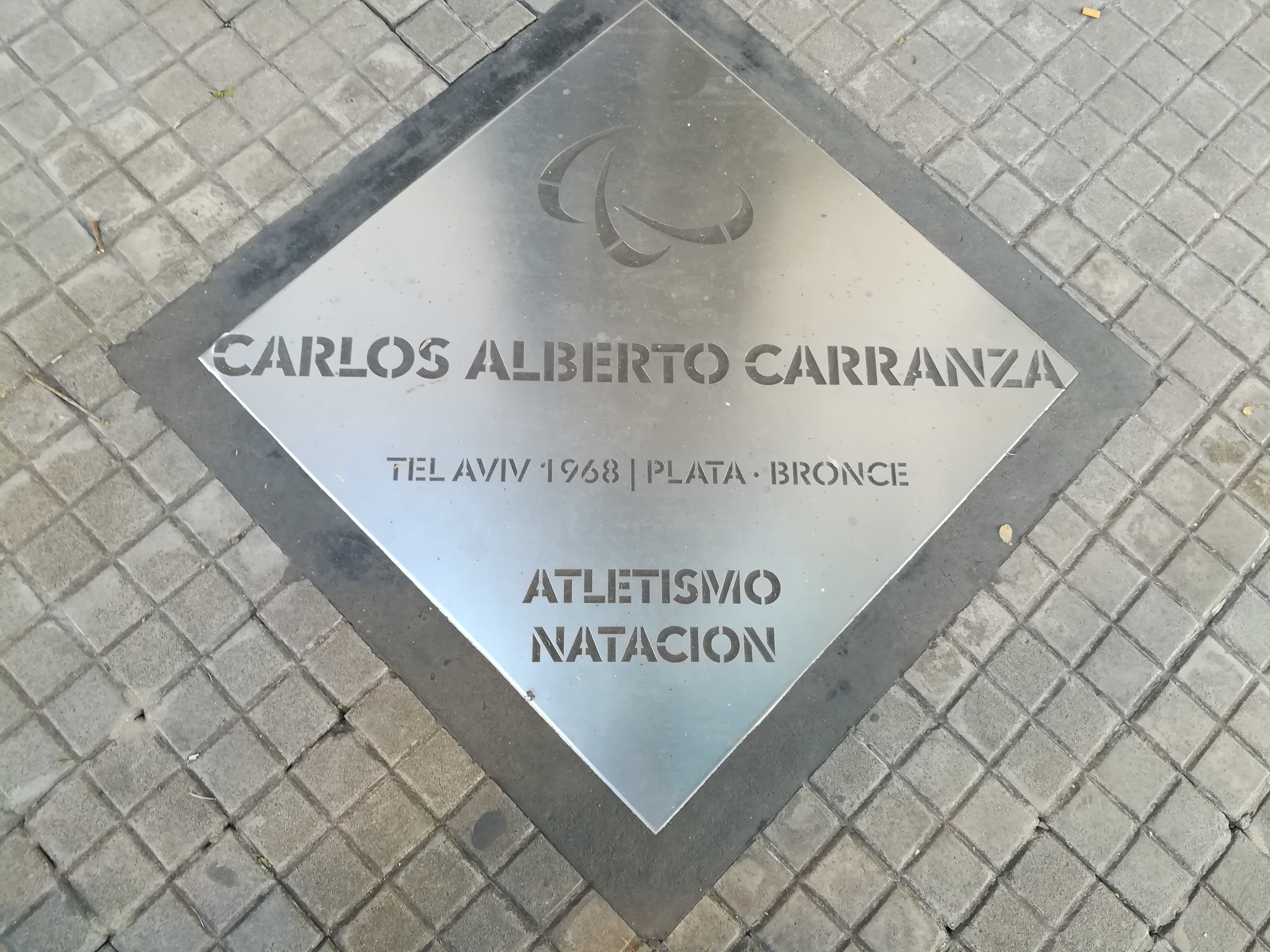 Paseo de los Olímpicos de los en la Avenida Pellegrini (Rosario).